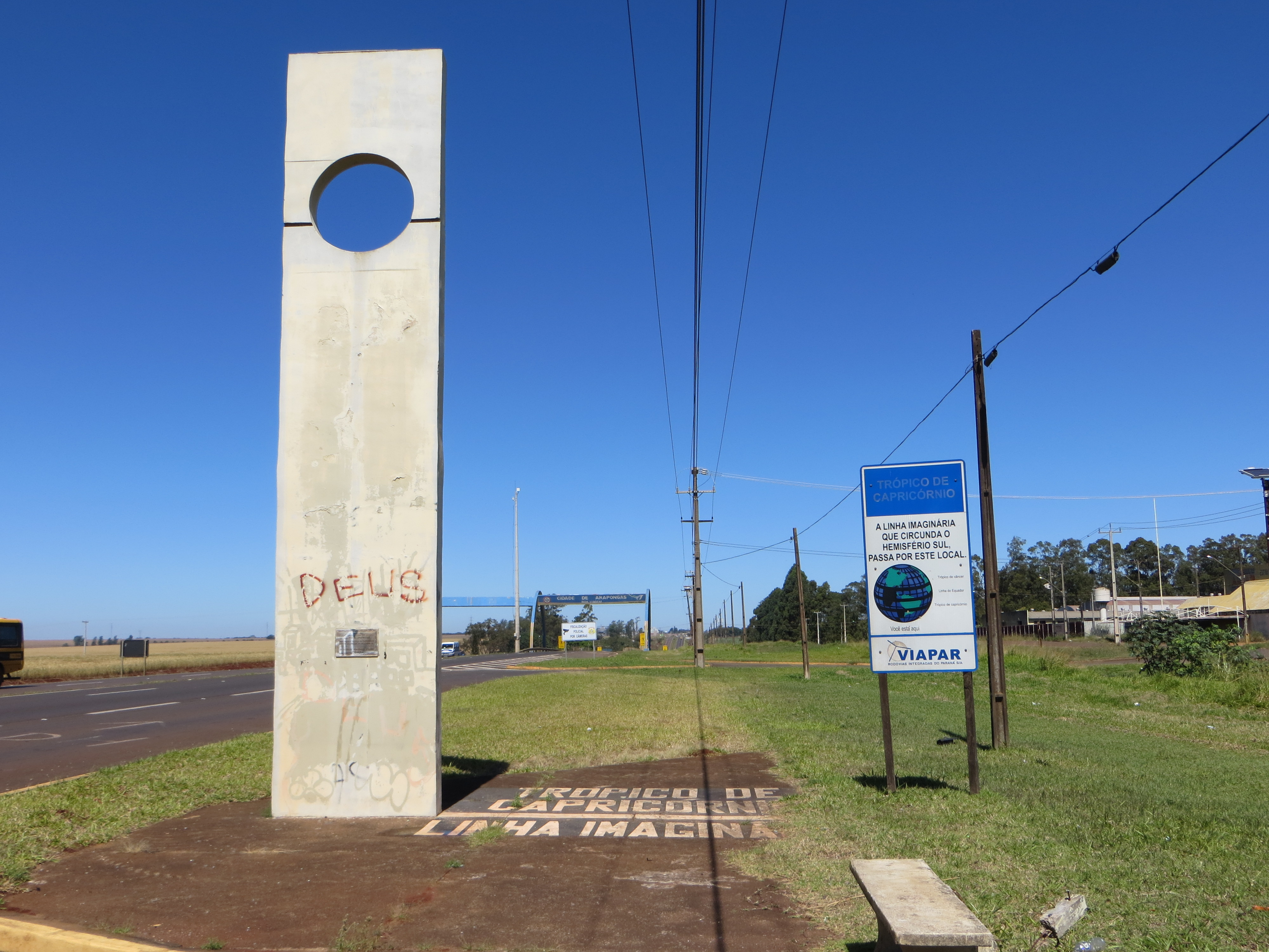 Marco do Trópico de Capricórnio, em Arapongas, Paraná, Região Sul do Brasil.